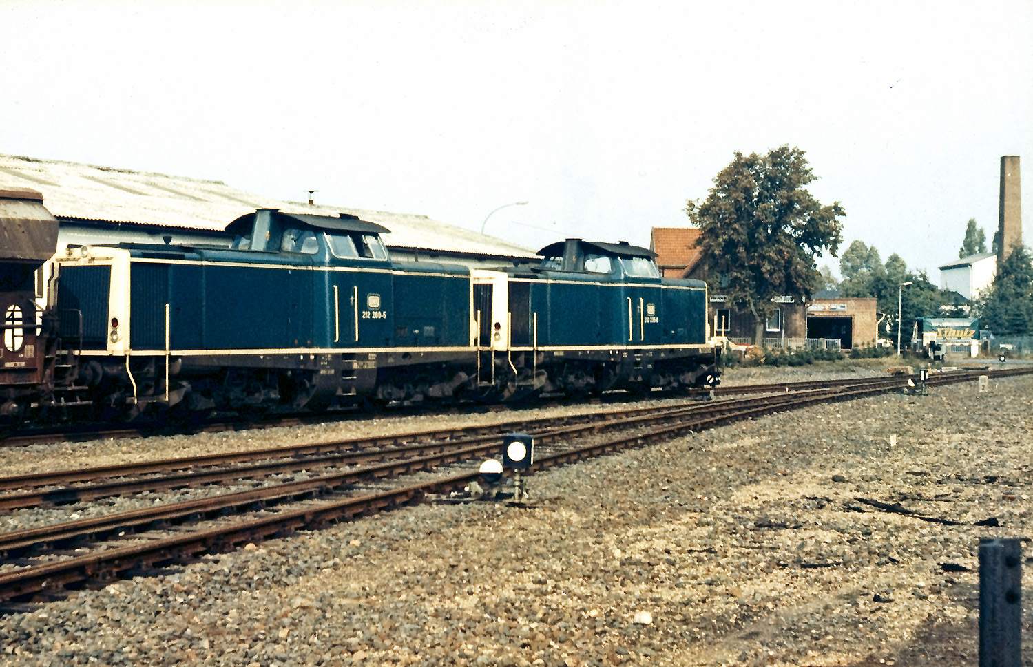 Diesellokomotive 212 269-5 in Doppeltraktion mit Diesellokomotive 212 235-6 verlassen mit einem Güterzug den Bahnhof Lüchow.